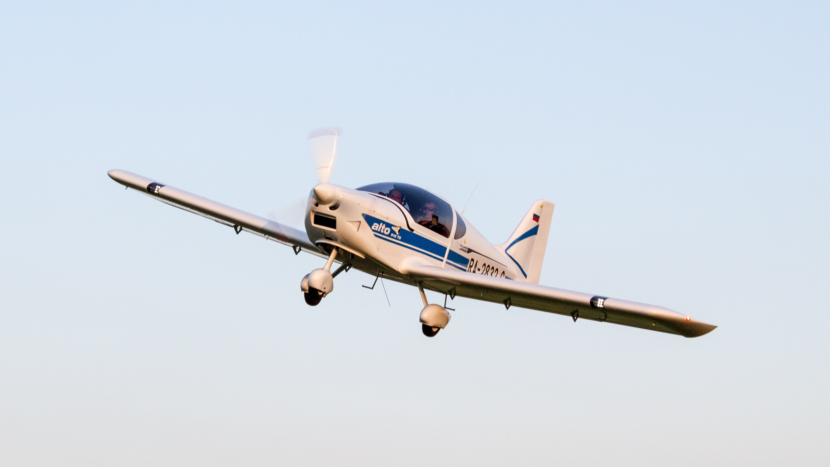 ALTO 912TG v letu